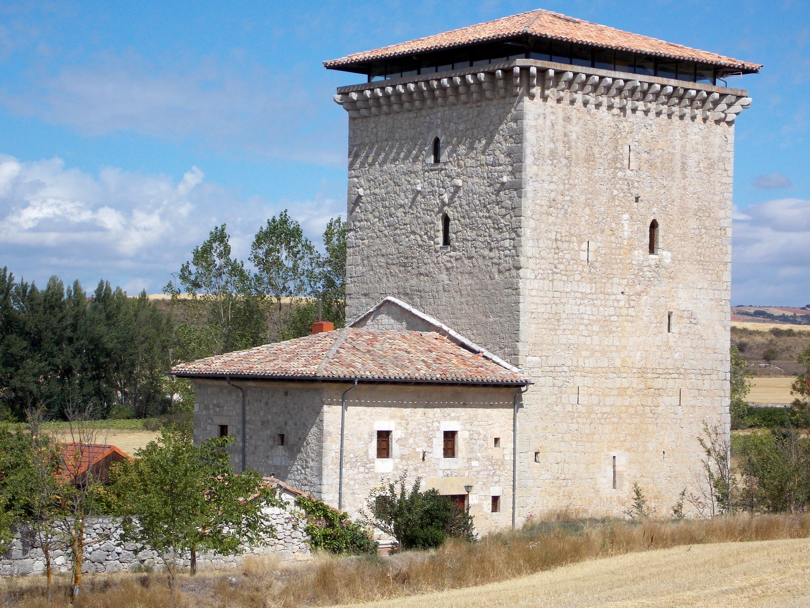 Torre palcio señorial de Villaute (España). Fue declarado monumento nacional el 22 de abril de 1949.